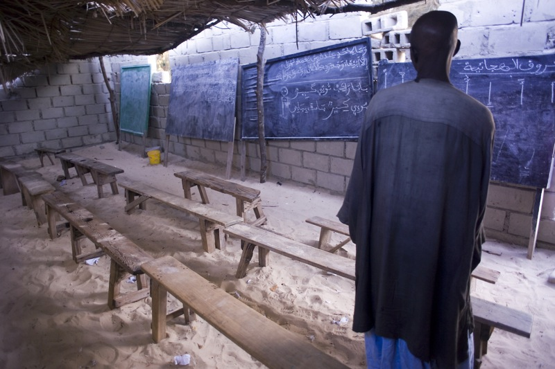 Salle de classe dans un village au Sénégal